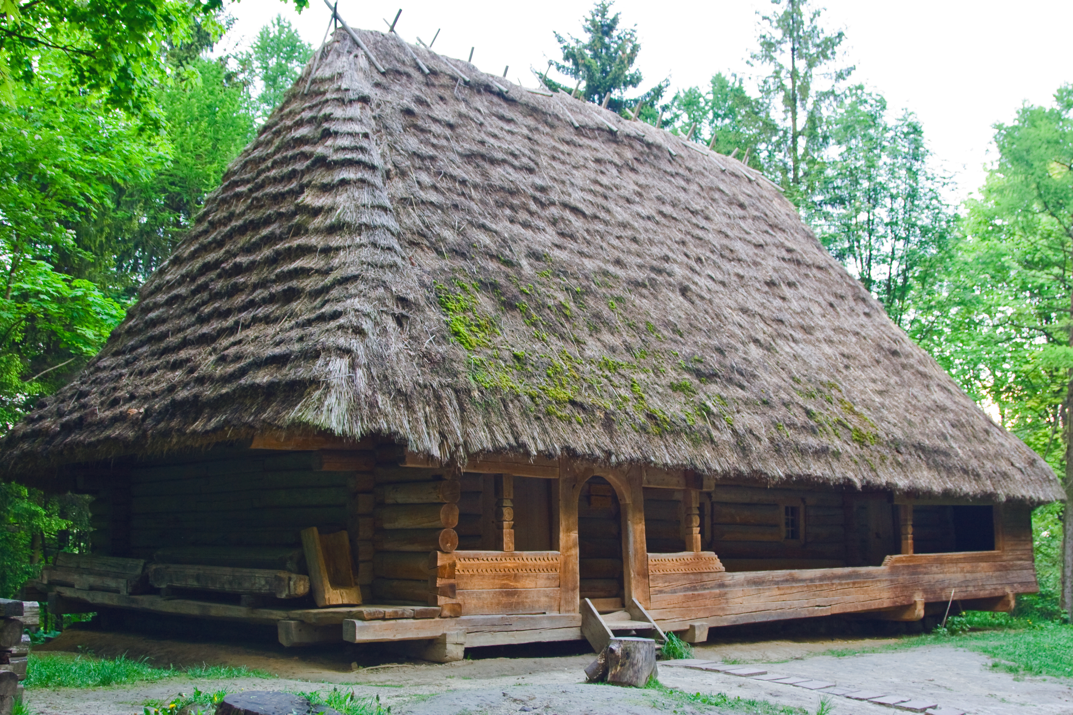 Хата з с.Тухолька Сколівського р-ну Львівської обл., Львів, вул.Чернеча Гора, 1